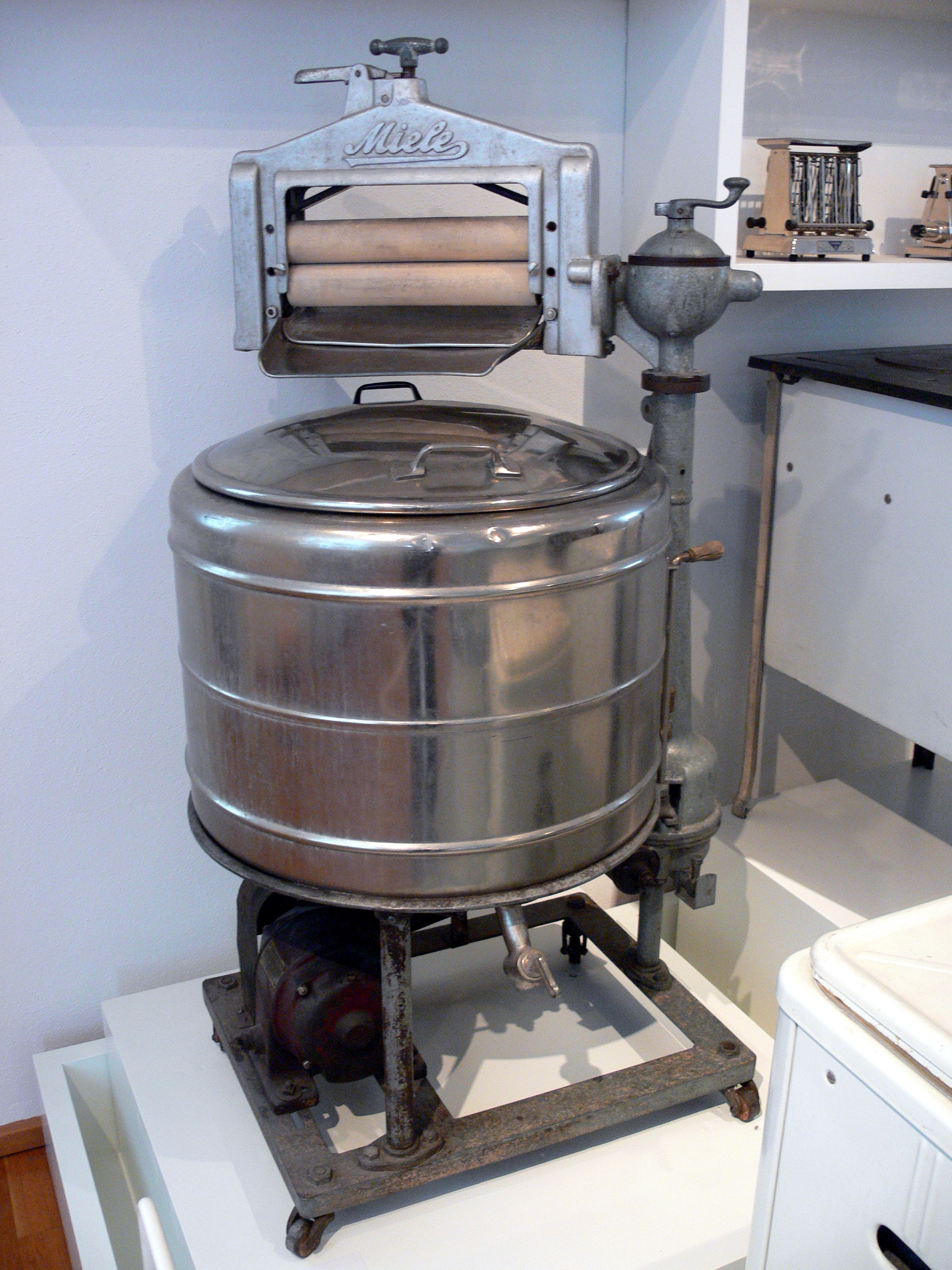 Elektrowaschmaschine Miele Nr. 100 ab 1930 hergestellt, erste Metallbottich-Waschmaschine von Miele, Kaufpreis 1930: 400 RM Landesmuseum Württemberg (Außenstelle Museum für Volkskultur in Württemberg, Waldenbuch) 2.3., Inv. Nr. VK 1988/016